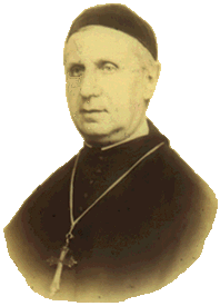 Dom Pietro Casaretto, Generalabt und Gründer der Sublazenser Benediktinerkongregation